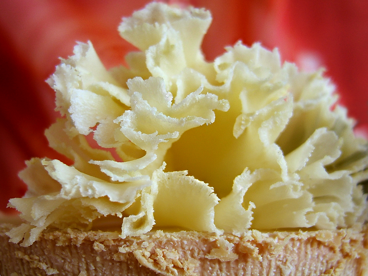 Tête de Moine, ein Schweizer Käse